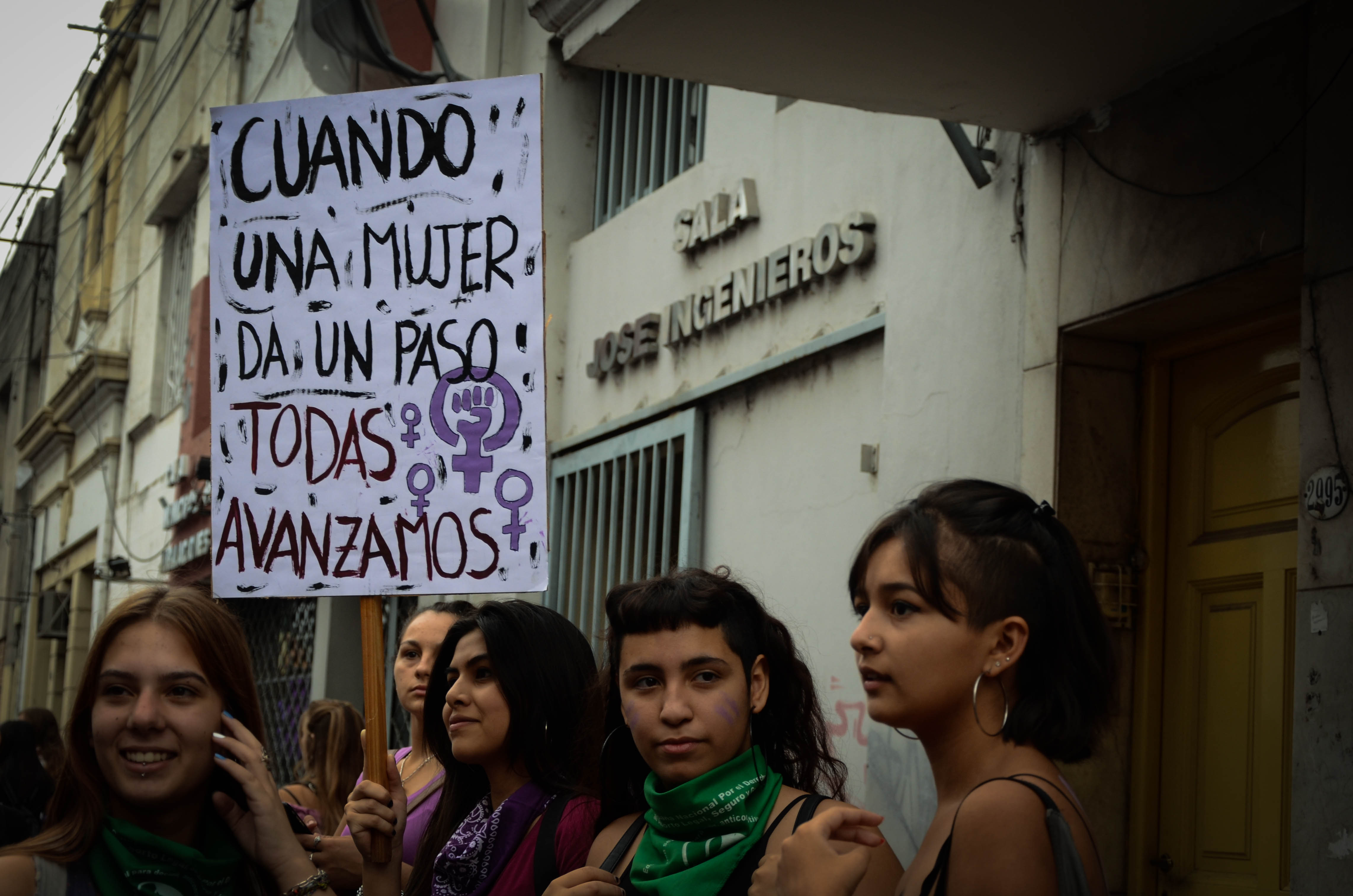 Segundo Paro Internacional de Mujeres - 8M - Santa Fe - Argentina